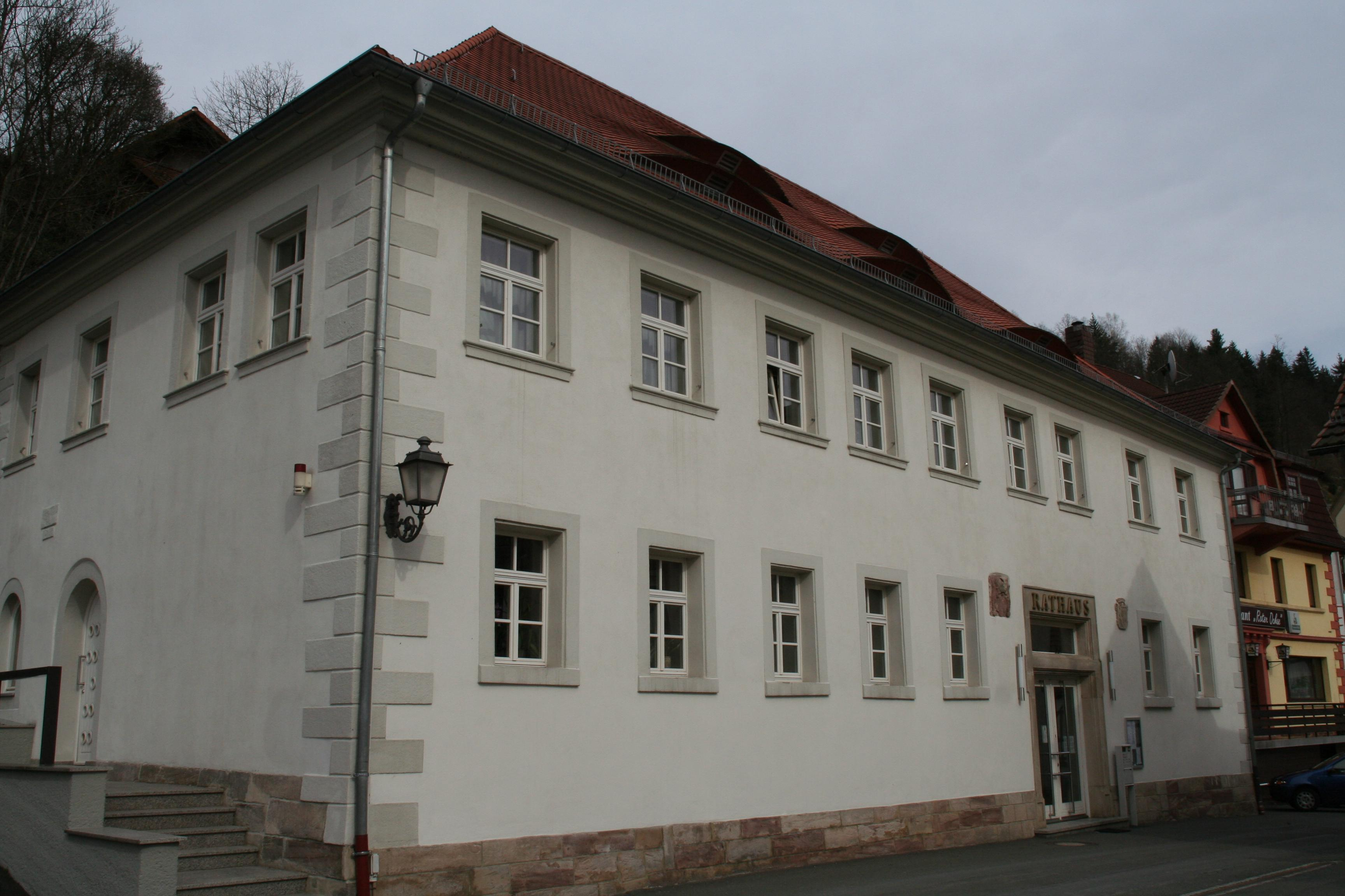 Wallenfels im Landkreis Kronach, Rathaus